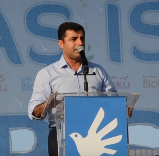 Halkların Demokratik Partisi Eş genel Başkanı Selahattin Demirtaş, İstanbul Barış Bloku'nun "Barışı biz inşa edeceğiz" mitinginde konuşan konuşma yapıyor.